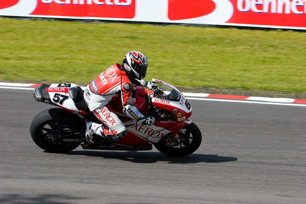 Lorenzo Lanzi, WSBK Round 10 Brands Hatch 2007